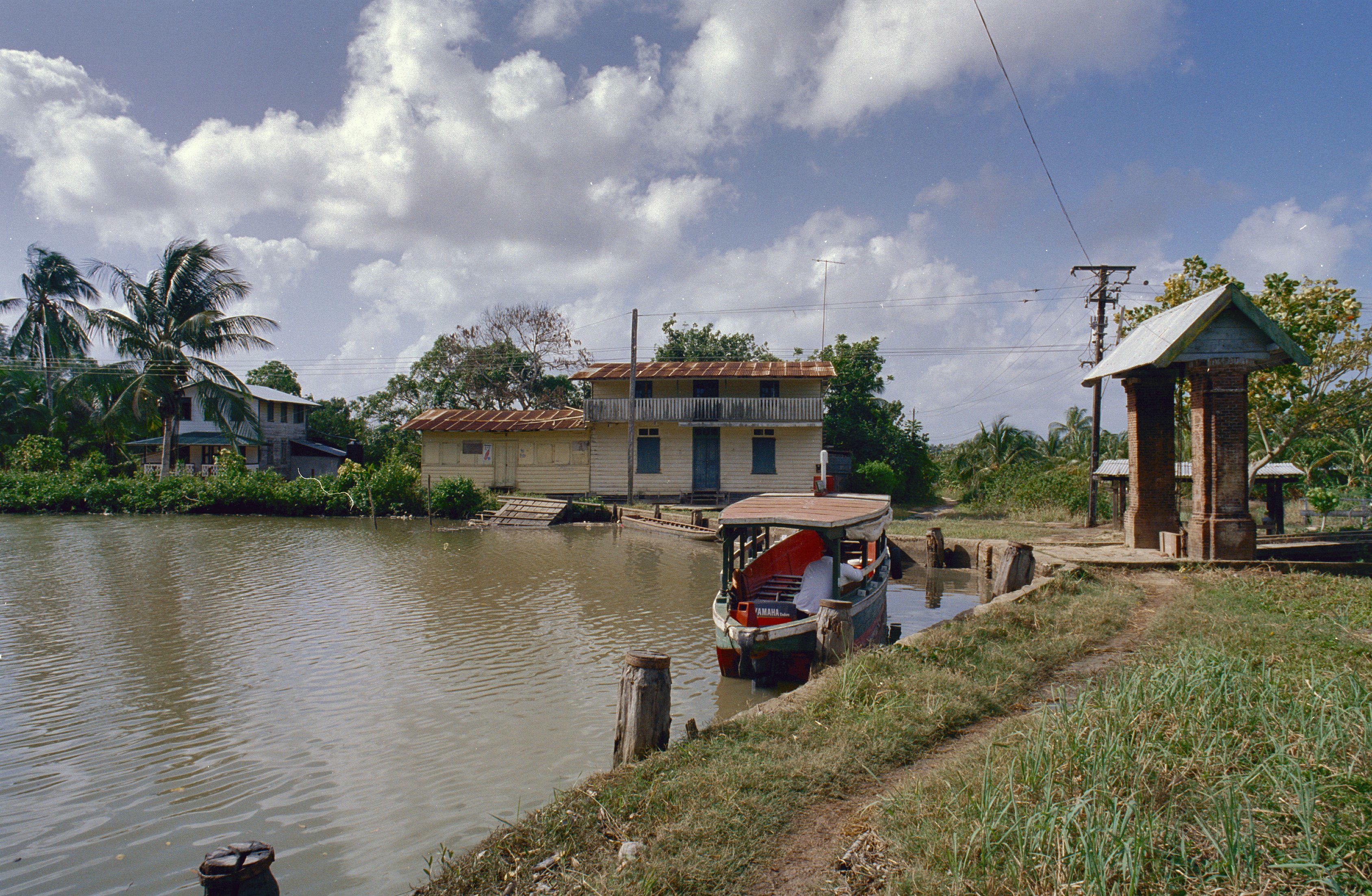 Koloniale geschiedenis/ Sluis: Overzicht Sluis met omgeving (opmerking: Suriname Reis Loek Tangel)